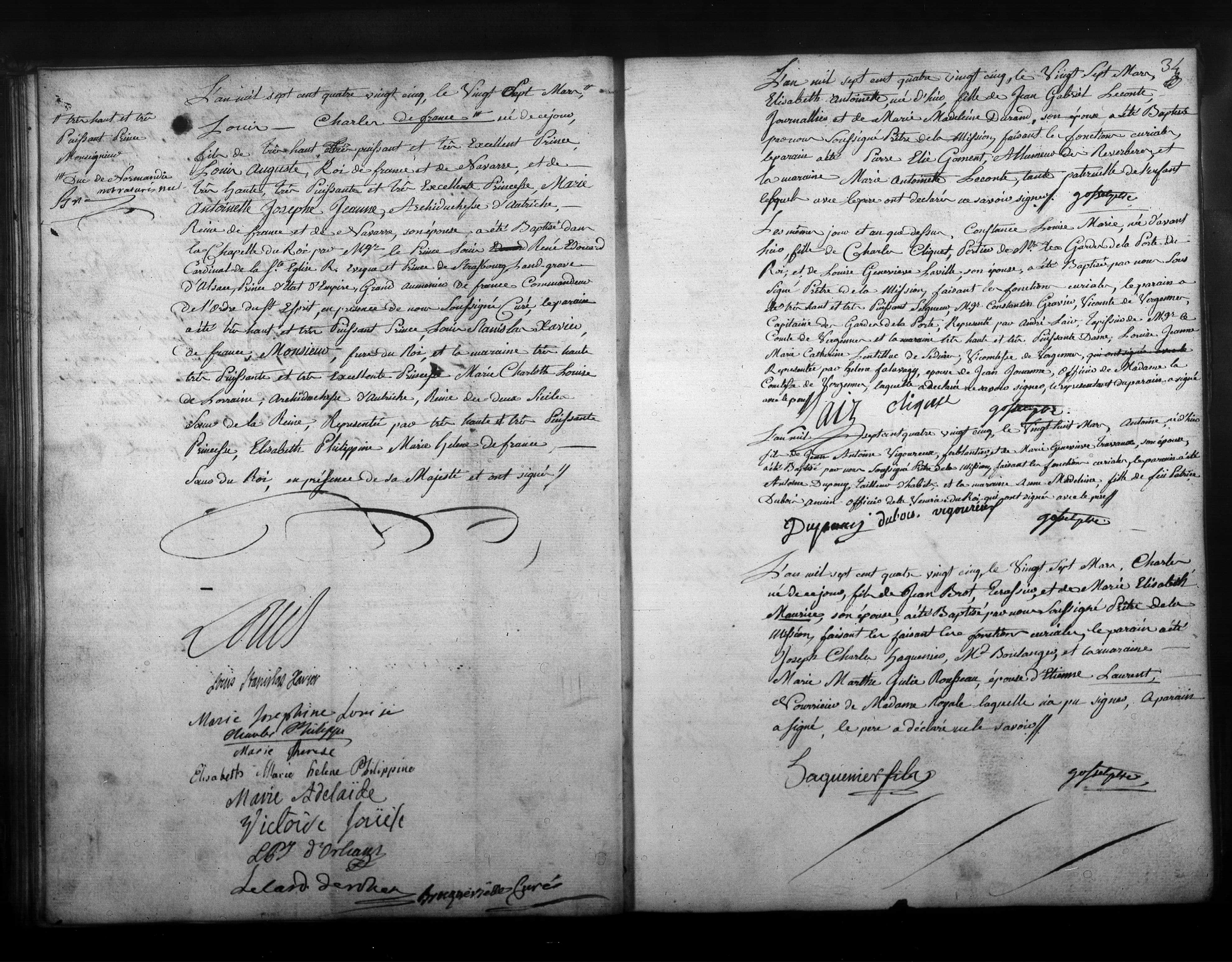 archives Yvelines